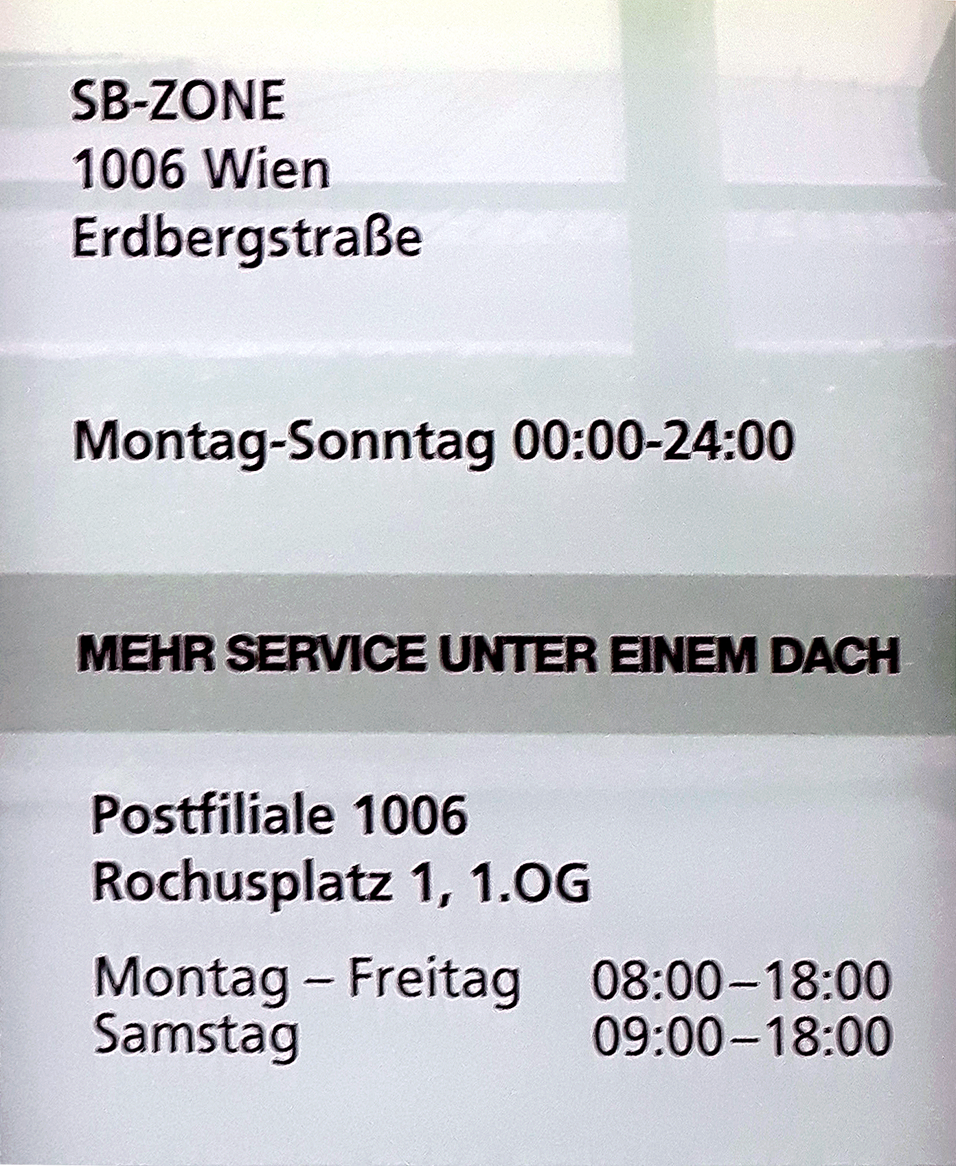 Postfiliale 1006 - Beispiel für eine österreichische Postleitzahl, die vom allgemeinen Schema abweicht. Üblich wäre 1=Wien, die zweite und dritte Stelle geben in der Regel den Gemeindebezirk an, dieses Postamt trug vor der Neugestaltung des gesamten Gebäudes die Postleitzahl 1030 (Maria-Eis-Gasse am Rochusmarkt). Das Postamt 1030 Wien wurde an eine andere Stelle, in die Hetzgasse 35 des 3. Bezirkes, verlegt.